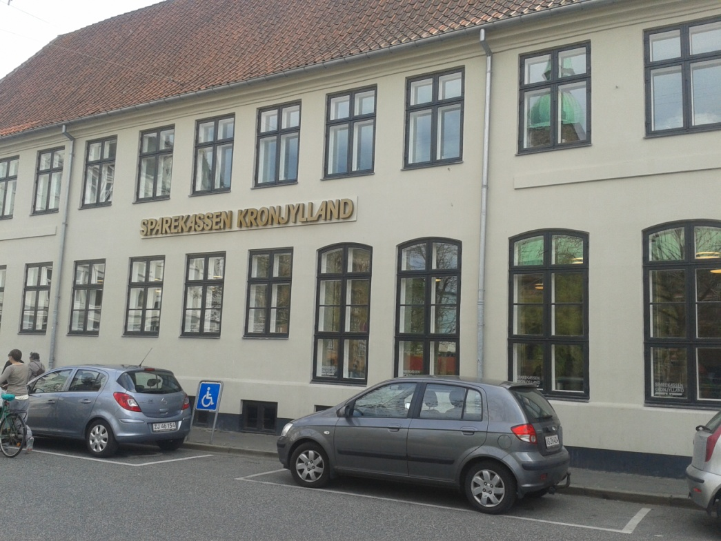 I dag huser Sparekassen Kronjylland den nyopførte bygning på Vester 11, hvor Aarhus Butterine Company lå.